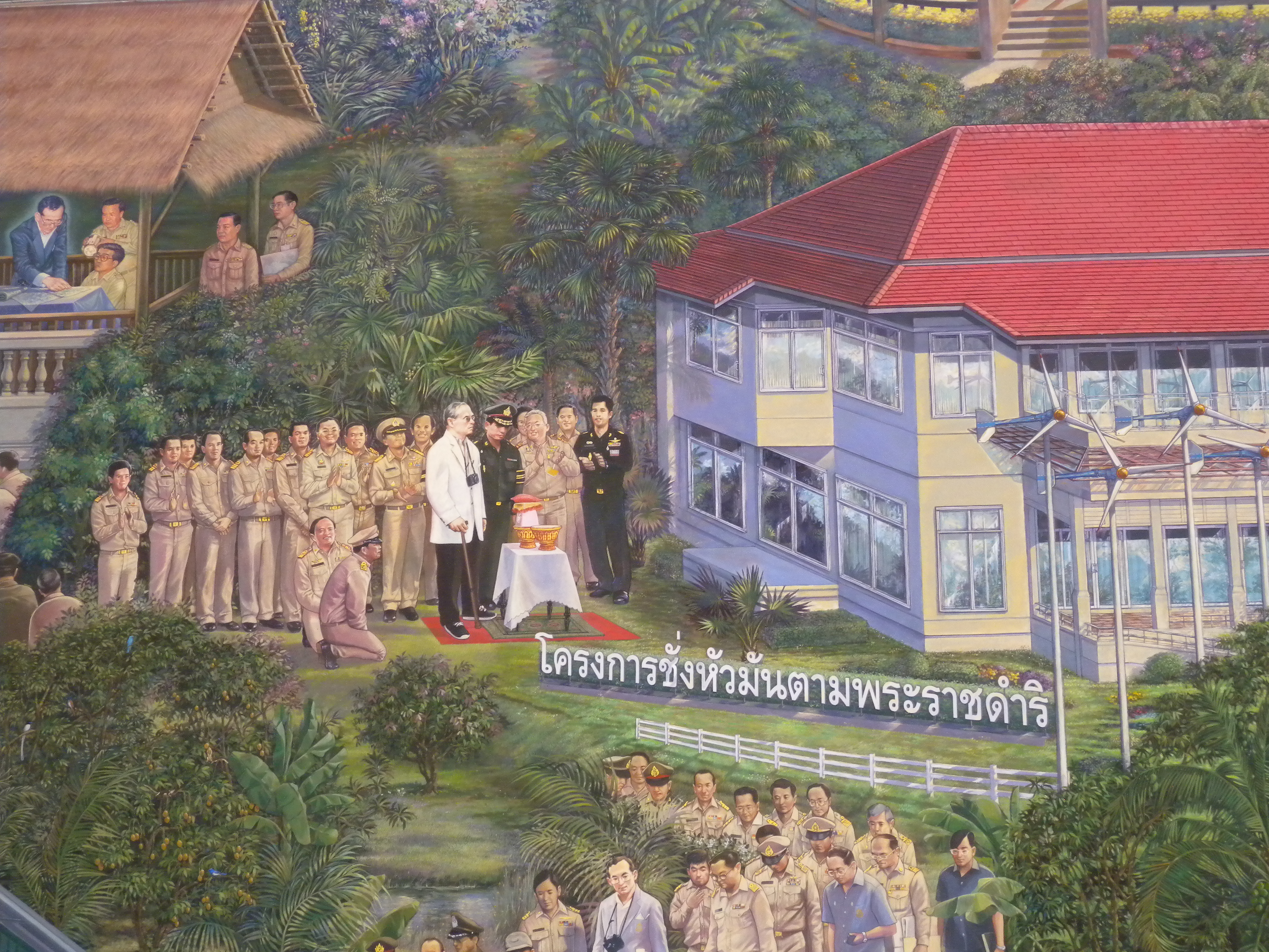 จิตรกรรมฝาผนังเล่าเรื่องโครงการในพระราชดำริ โครงการอันเนื่องมาจากพระราชดำริ และโครงการส่วนพระองค์ในพระบาทสมเด็จพระปรมินทรมหาภูมิพลอดุลยเดช ภายในพระที่นั่งทรงธรรม มณฑลพระราชพิธีถวายพระเพลิงพระบรมศพพระบาทสมเด็จพระปรมินทรมหาภูมิพลอดุลยเดช ในภาพนี้ แสดงภาพพระบาทสมเด็จพระปรมินทรมหาภูมิพลอดุลยเดชเสด็จพระราชดำเนินไปทรงเปิดป้ายโครงการชั่งหัวมันตามพระราชดำริ ณ บริเวณอ่างเก็บน้ำหนองเสือ บ้านหนองคอไก่ หมู่ที่ 5 ตำบลเขากระปุก อำเภอท่ายาง จังหวัดเพชรบุรี เมื่อวันที่ 1 สิงหาคม พ.ศ. 2552